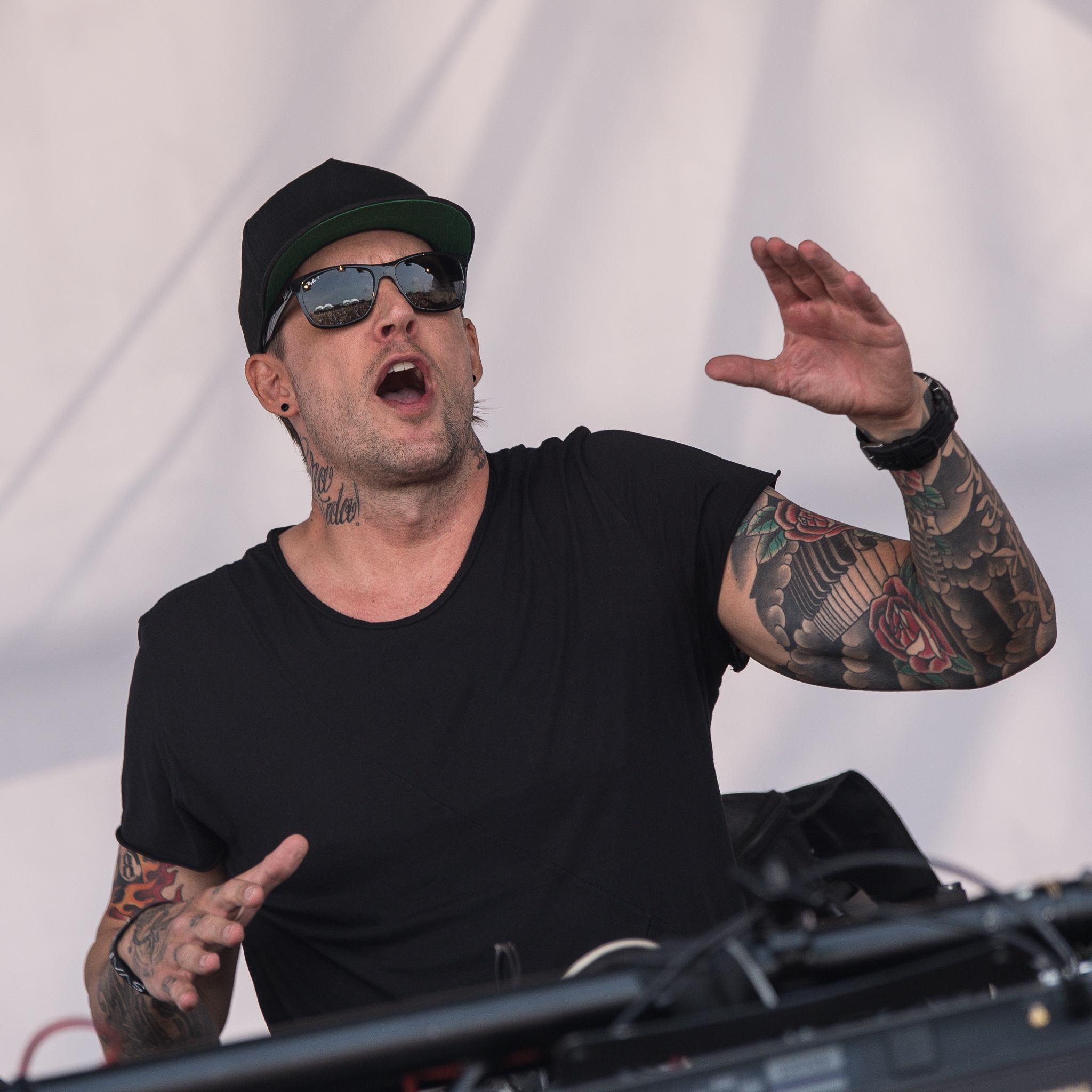 Festival,Konzert,Livekonzert,Livemusik,Mainstage,Musik,Niels van Gogh,Open Beatz 2016